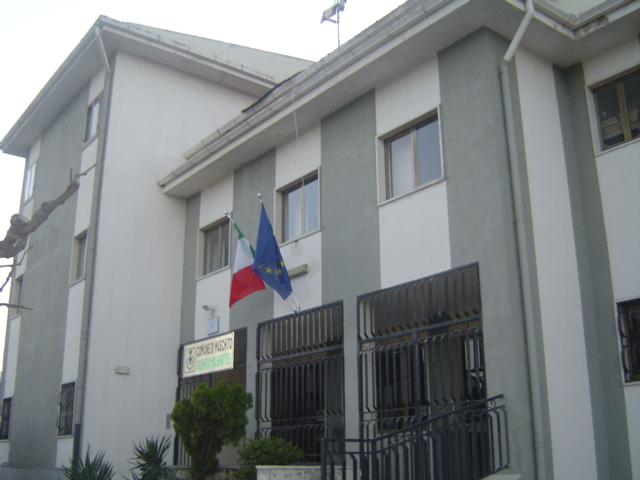 Autore: G.De Luca, fonte: propria fotocamera